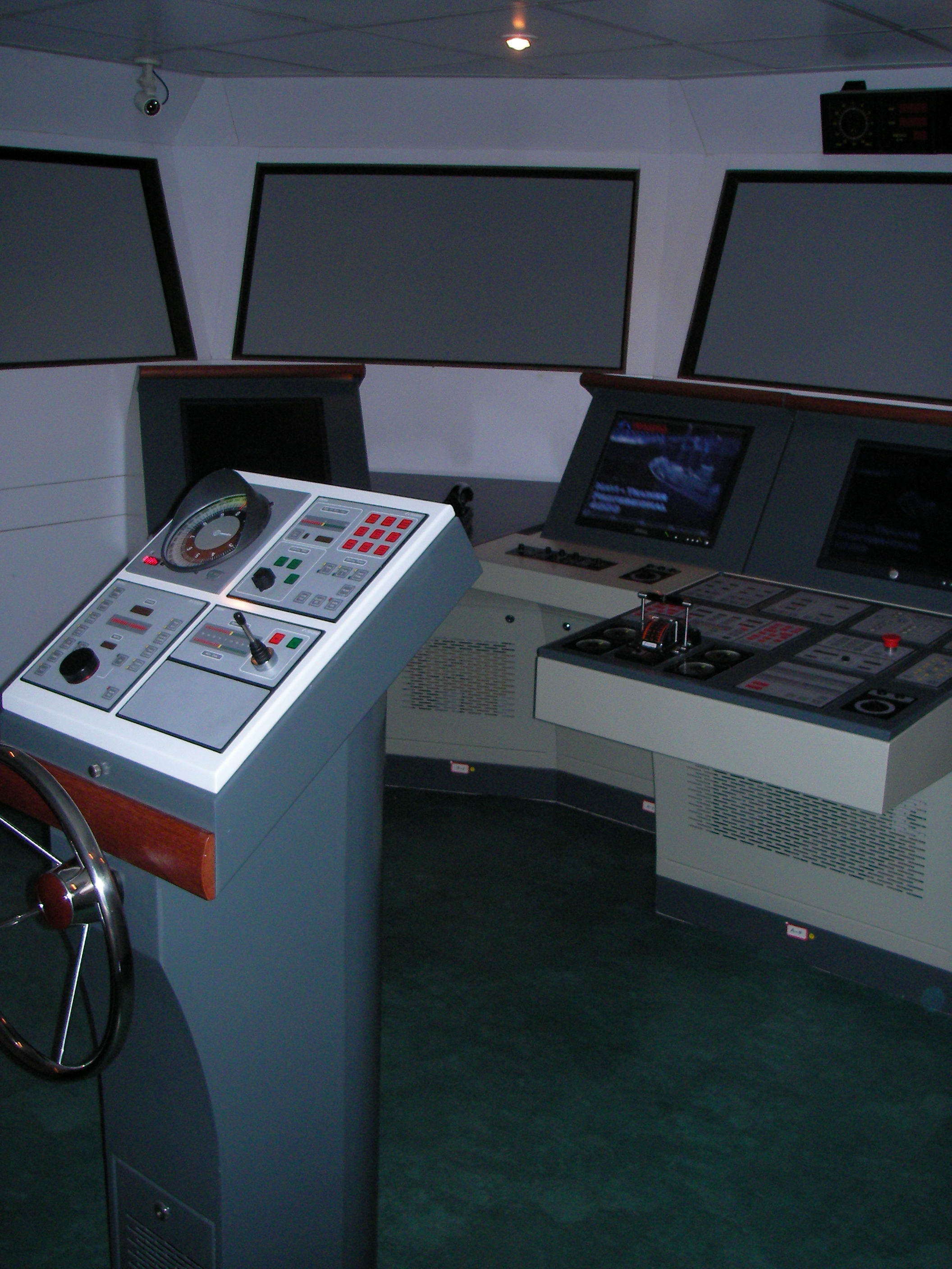 中文（香港）: 船舶操控模擬系統